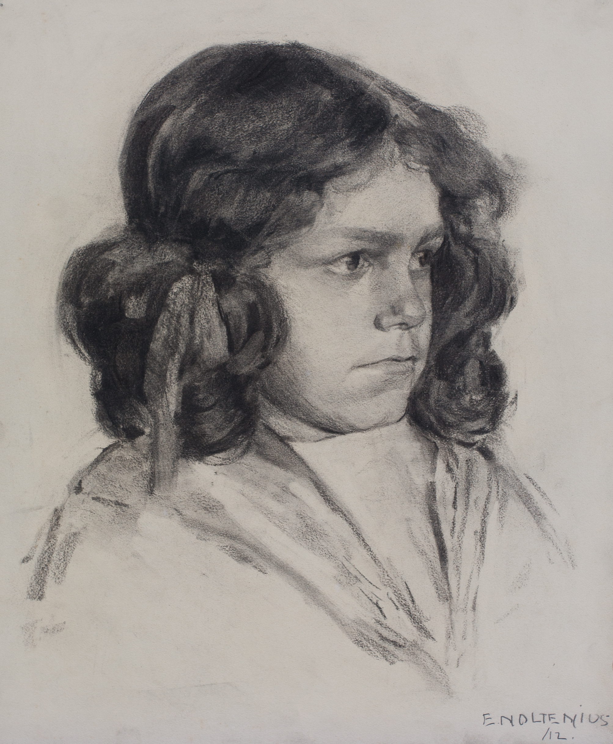 Zorniges Mädchen, Kohle, 1912 Focke-Museum Bremen Foto: Victor Ströver